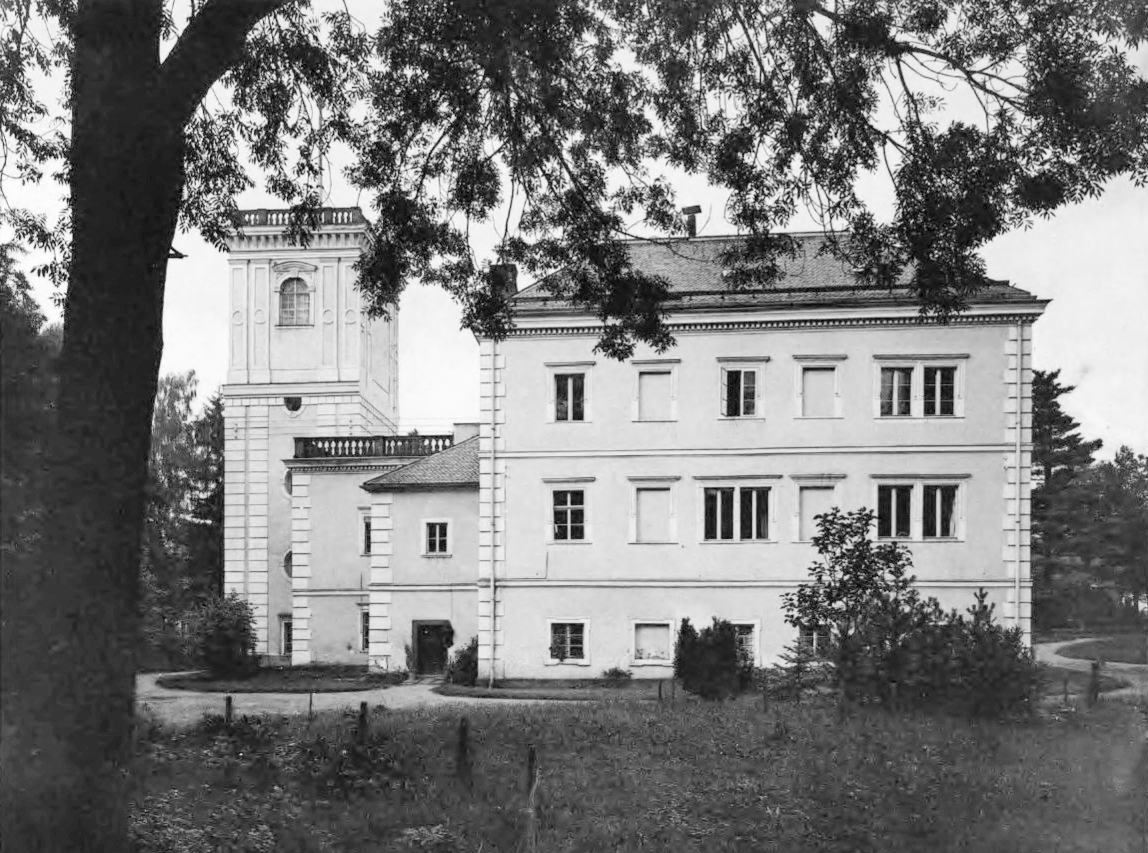 Schlegel - Kreis Neurode, przycięty i desaturacja